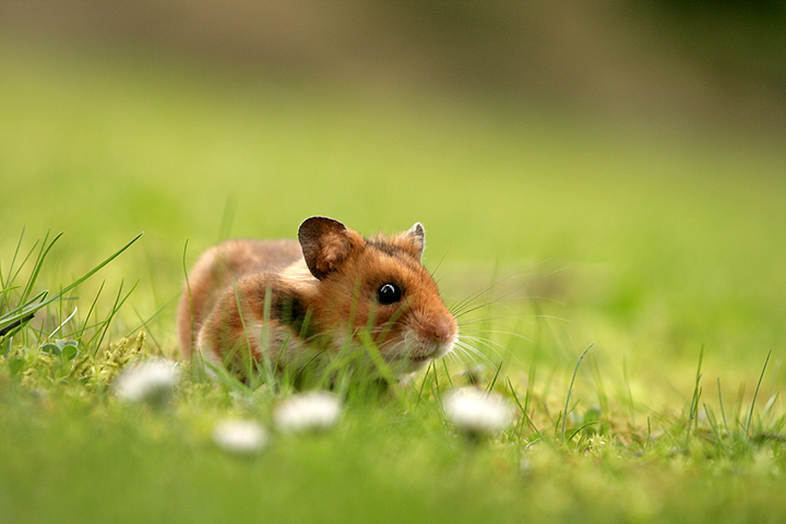 Goldhamster auf der Wiese